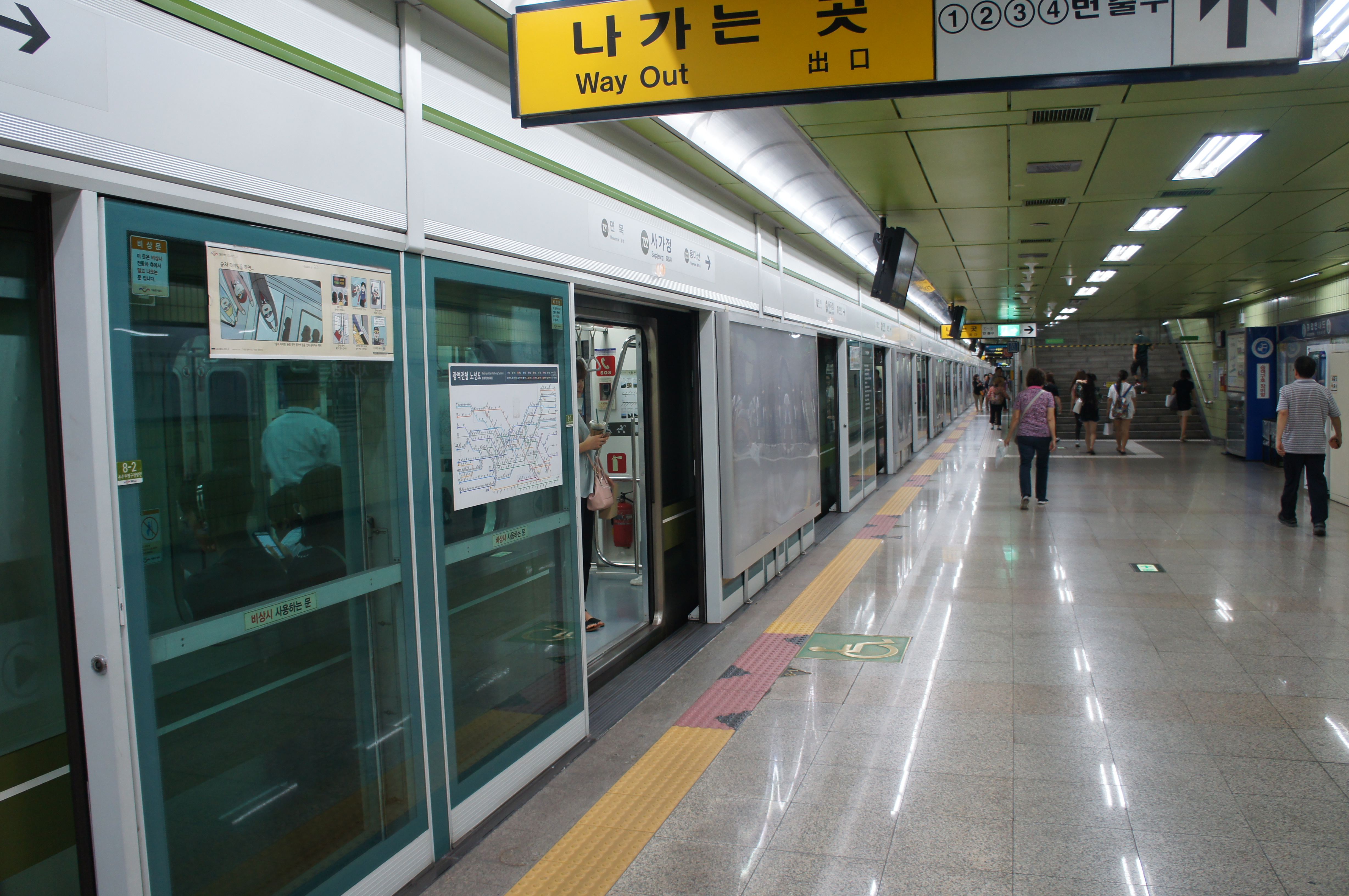 사가정역 승강장